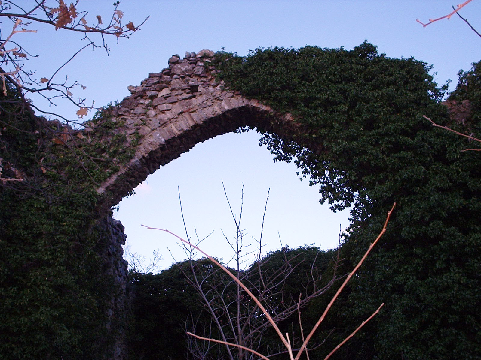 Autore: Rocco Stasi. Fonte: Fatta da me. Descrizione: Particolare della chiesa della Trinità. Arco oltre il quale vi era il presbiterio e la parte absidale della chiesa. Licenza d'uso: GFDL, sono l'autore.